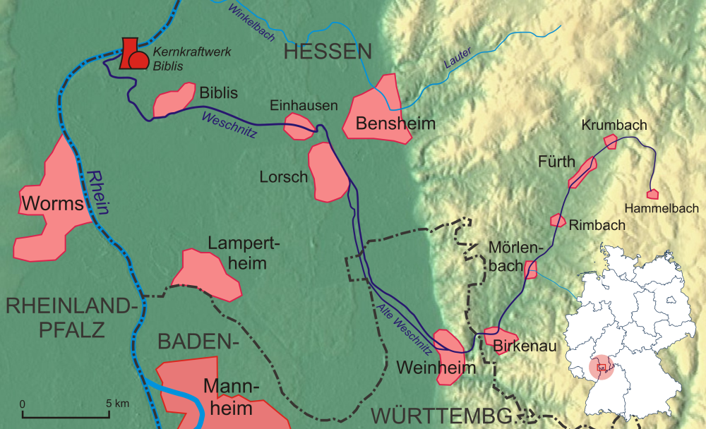 Verlaufskarte Weschnitz